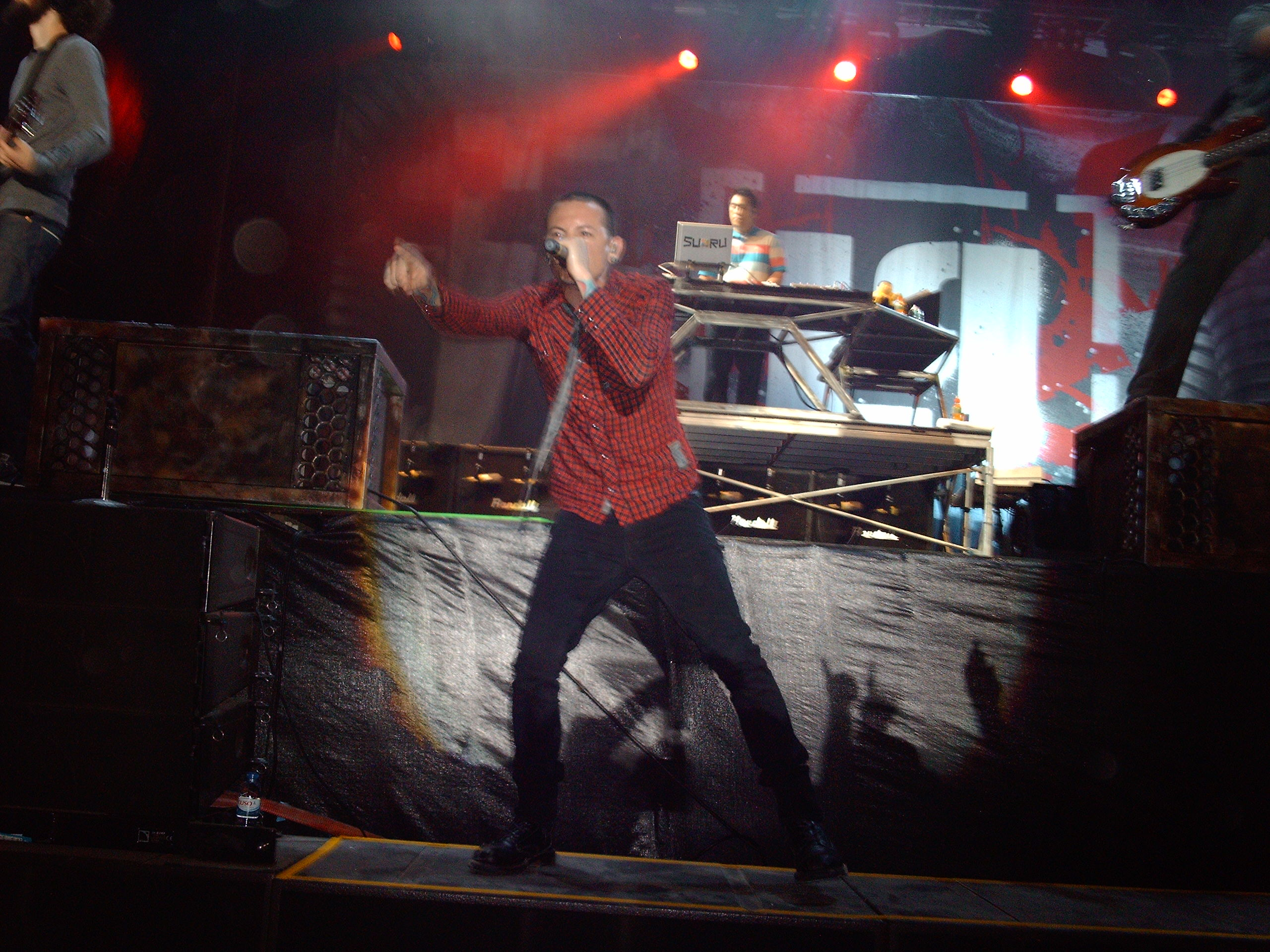 Linkin park in oeiras